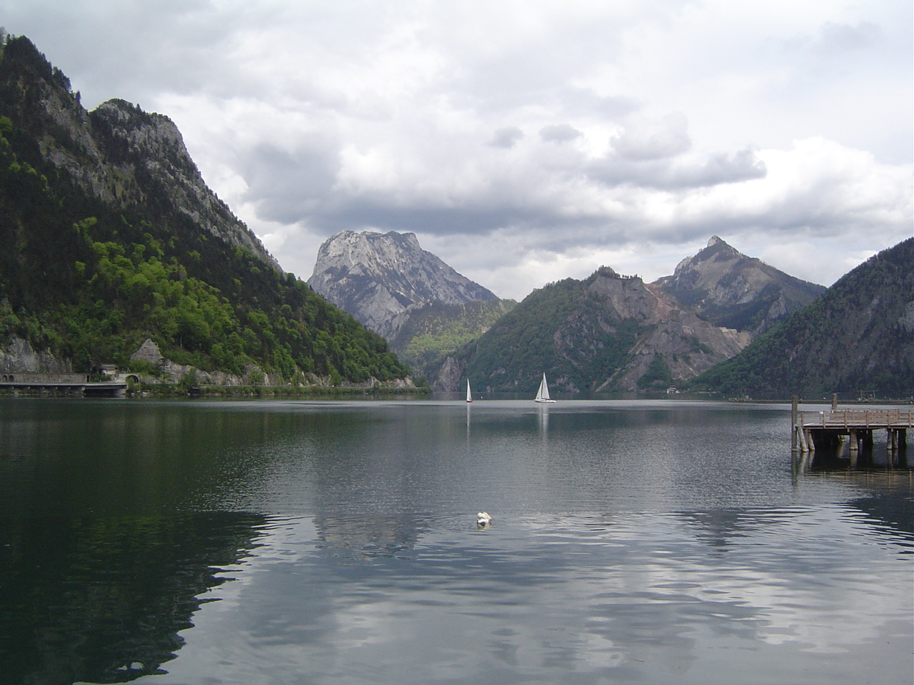 Ebensee: il lago Ebensee - foto realizzata da Utente:Microsoikos